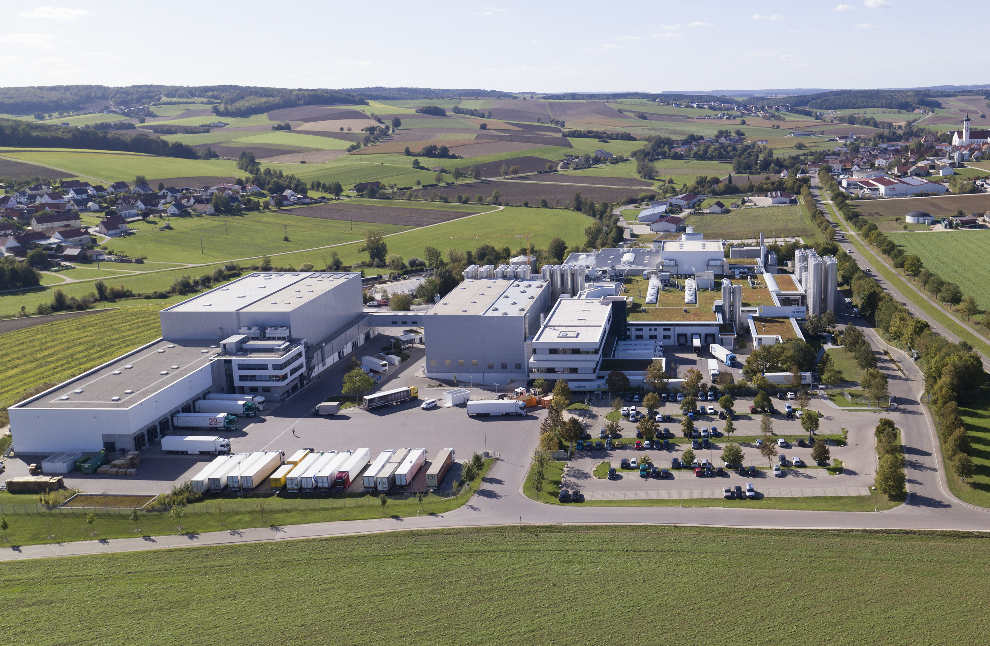 Molkerei Gropper Standort in Bissingen, Drohnenaufnahme im September 2018